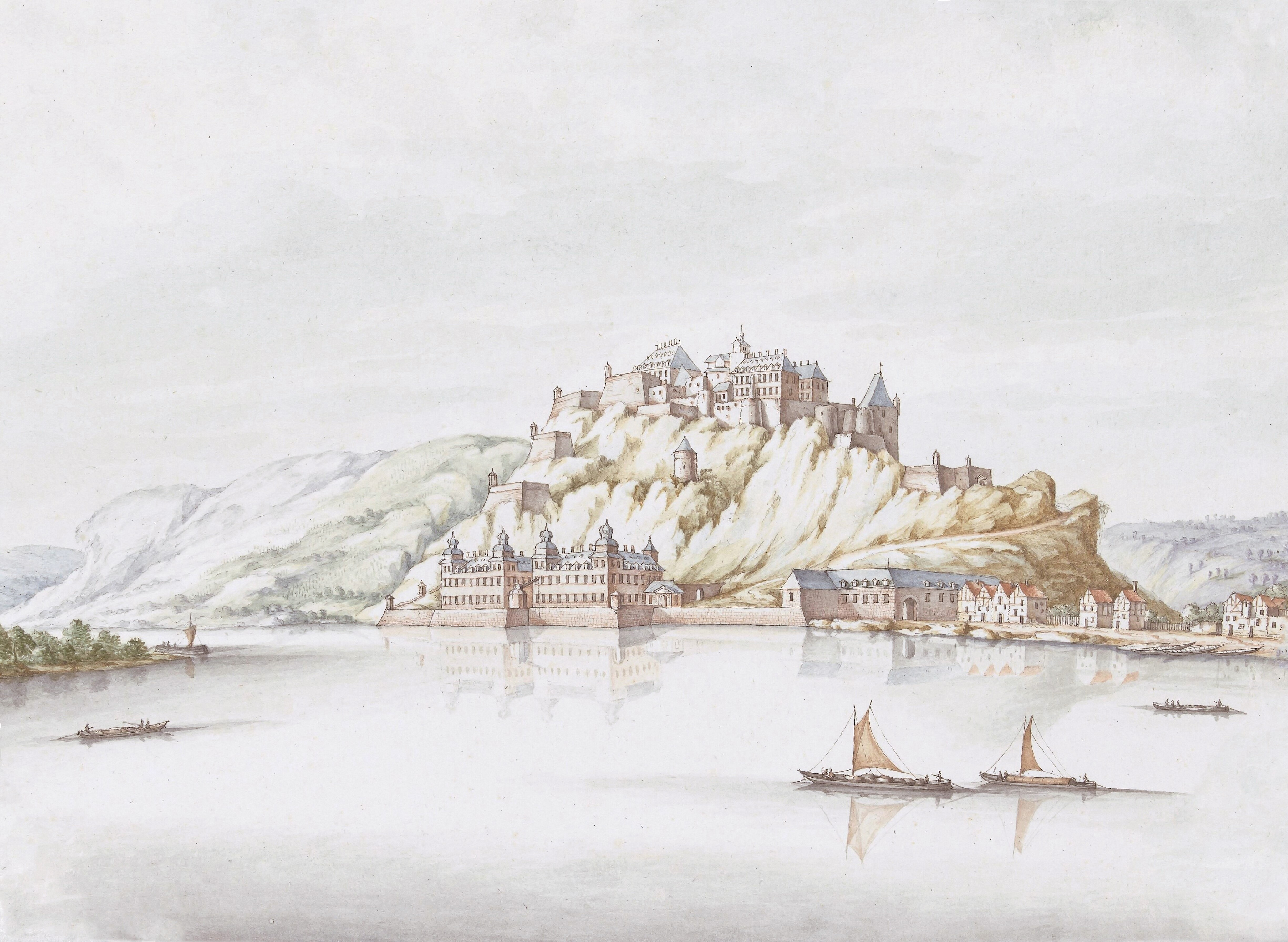 Die Reichsfestung Ehrenbreitstein, um 1700 (Ausschnitt)